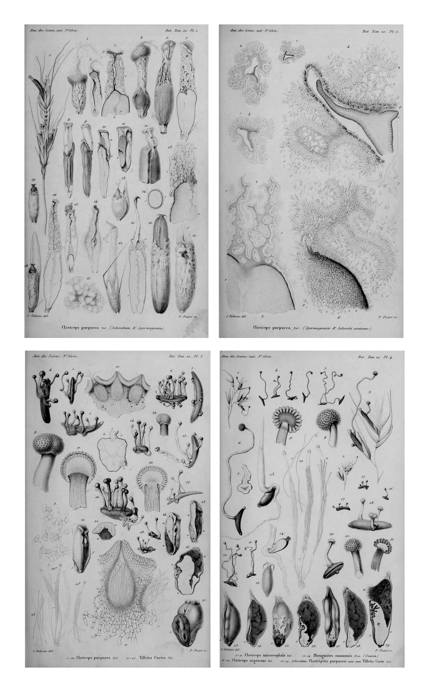 Abbildung von Mutterkorn